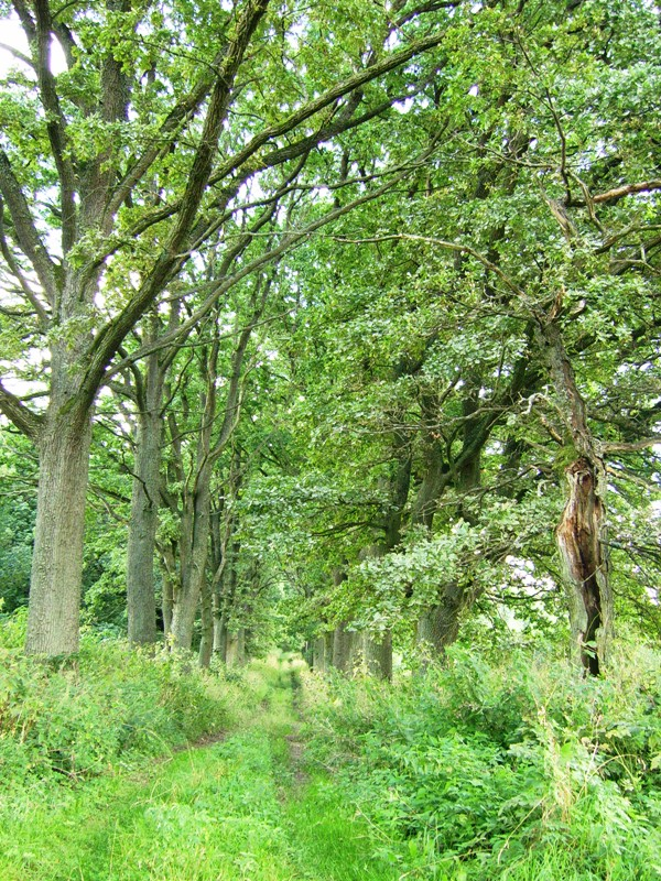 Vilkyškių ąžuolų alėja